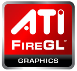 ATI FireGL Logo